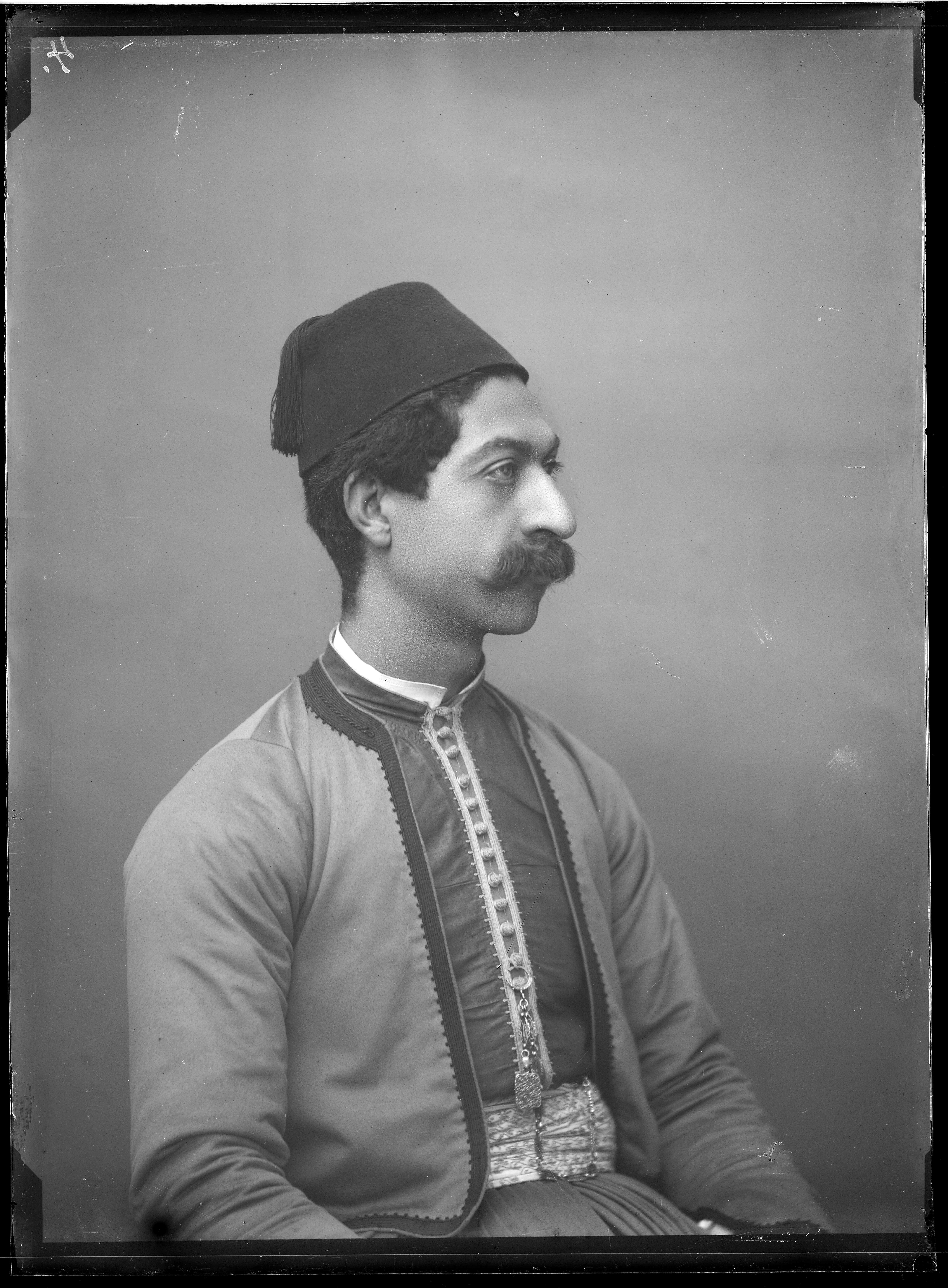 plaque négative au gélatino-bromure d'argent format 13x18cm. inscription manuscrite sur enveloppe : "Arménien"